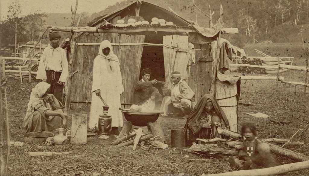 Оренбуржье. Башкир - 4. 1870-е. Автор К. Фишер.